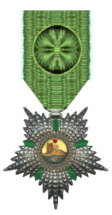 Orde van de Leeuw en de Zon